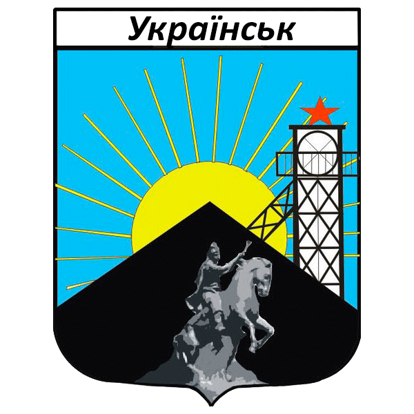 Герб Українська